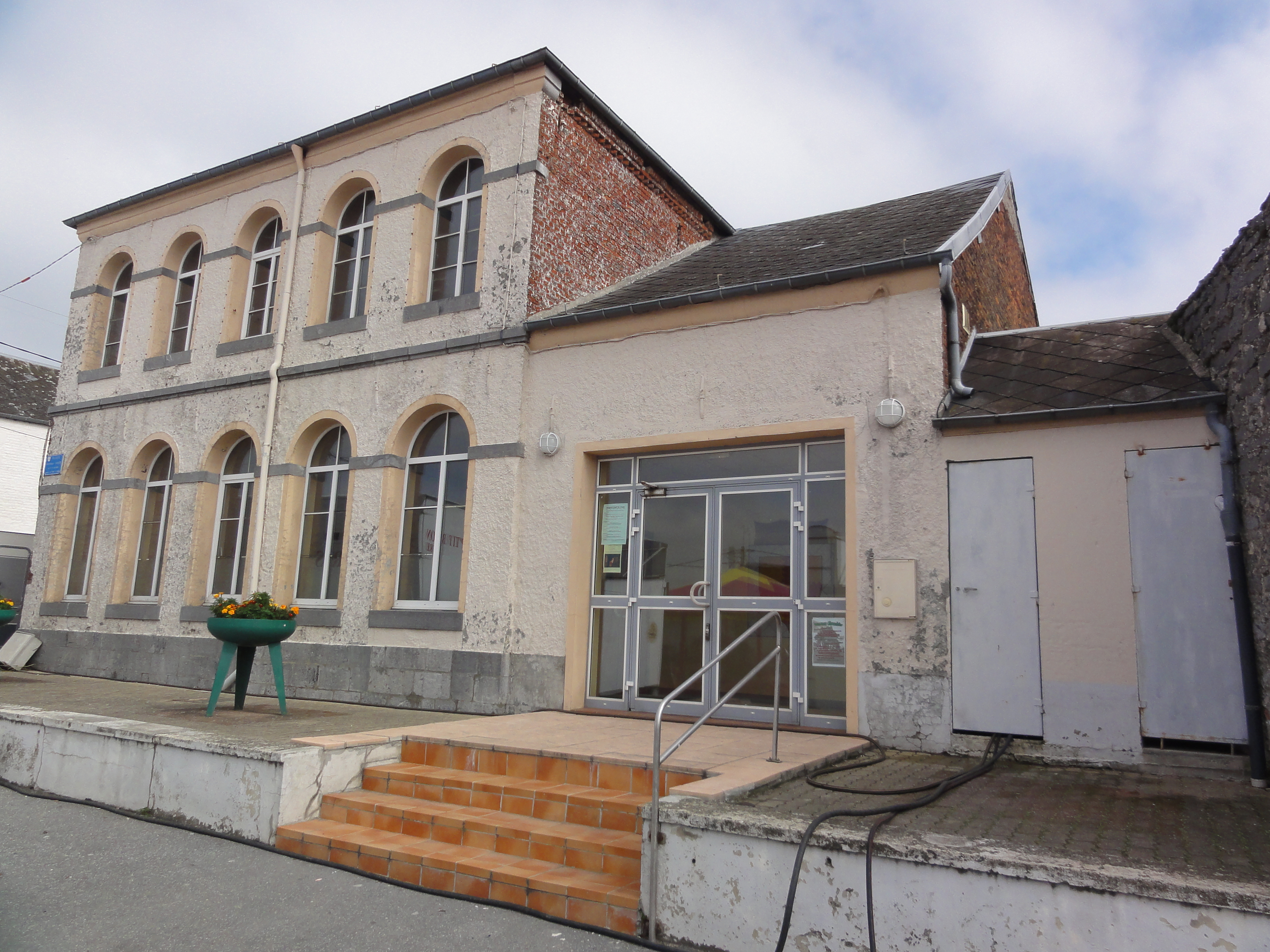 Cerfontaine (Nord, Fr) salle communale